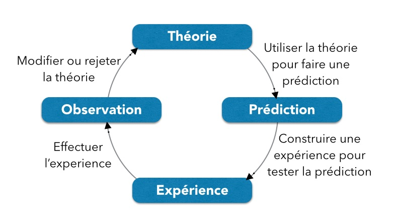 Schéma de la méthode scientifique